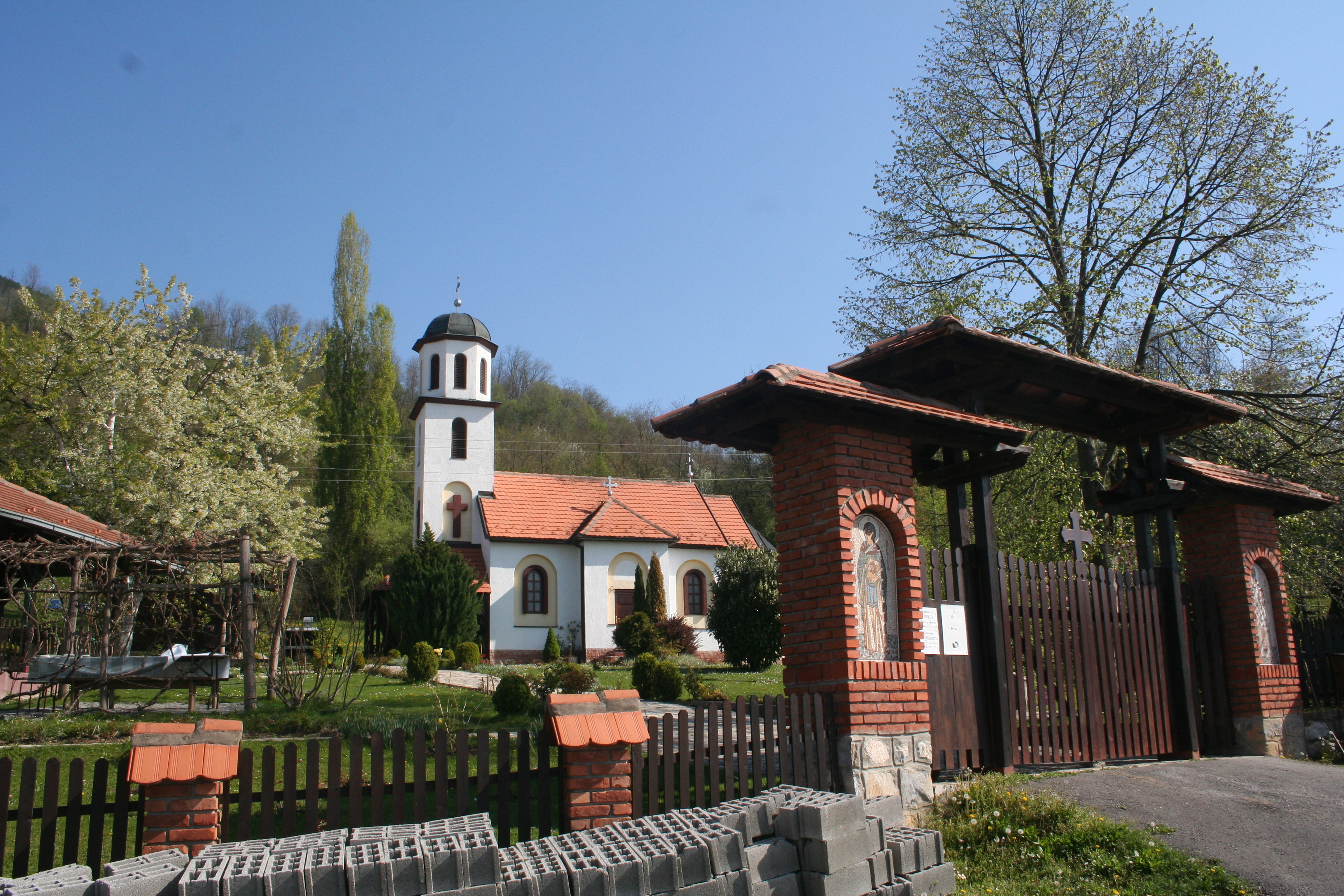 Manastir Bjele vode